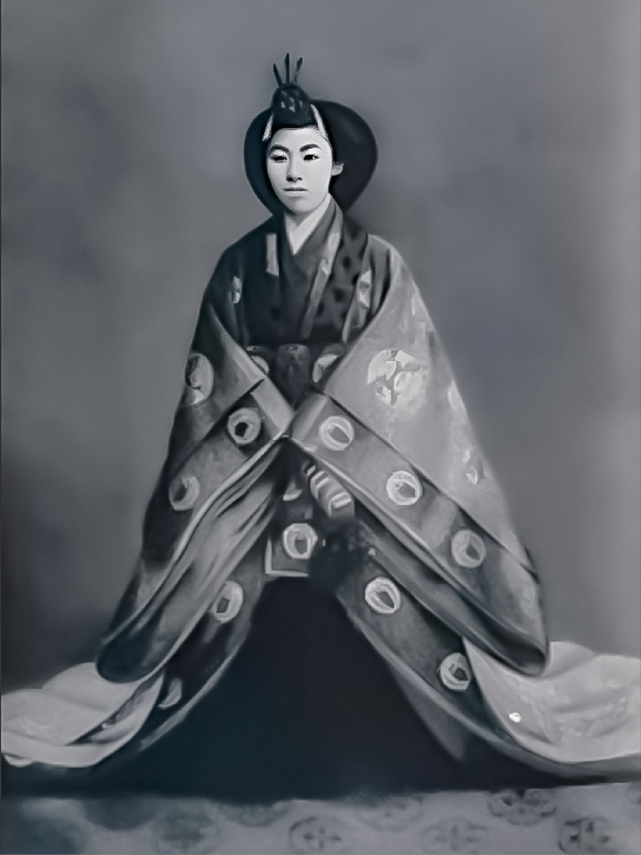 貞明皇后 十二単姿